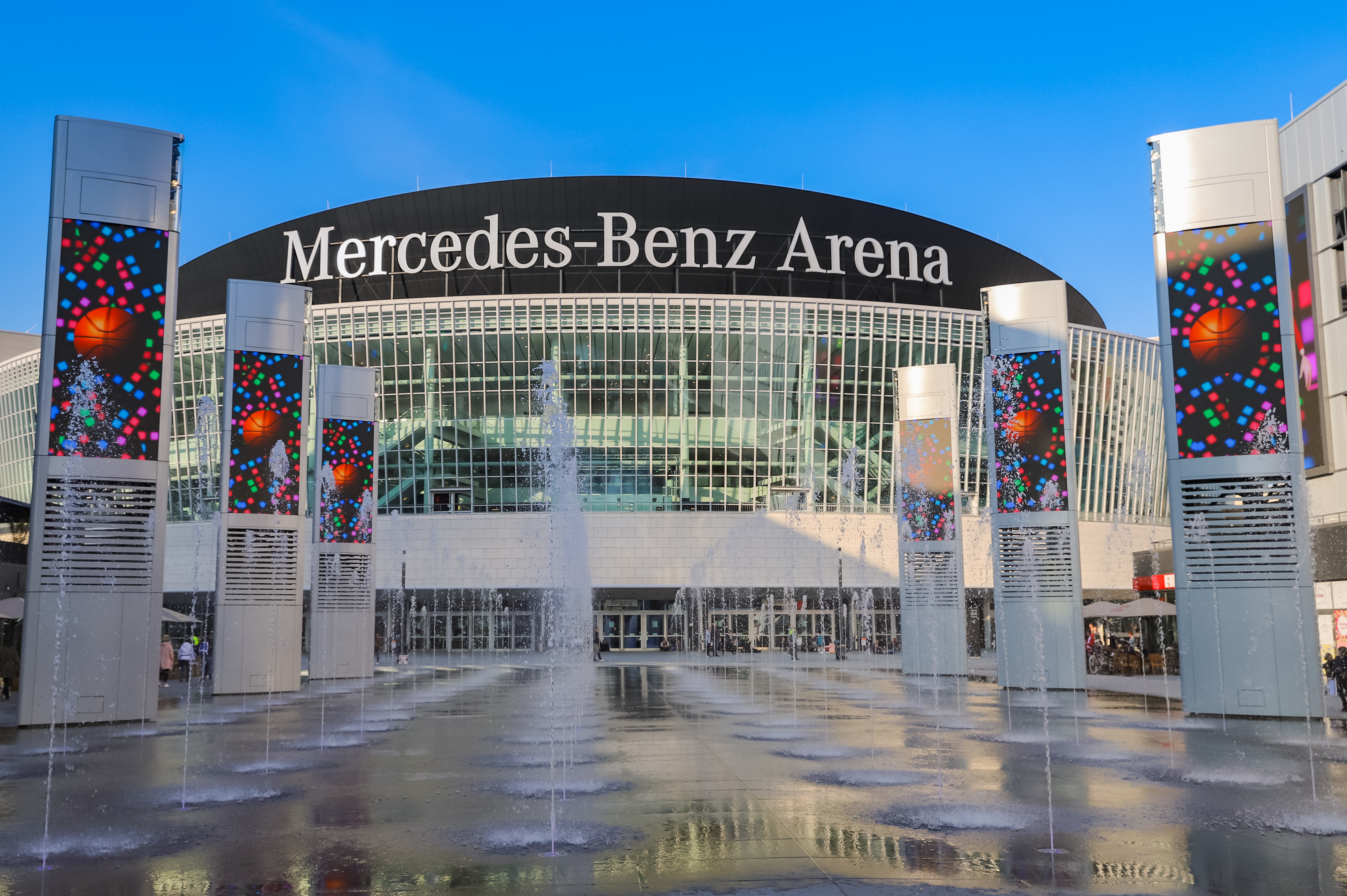 Mercedes Benz Dome Berlin